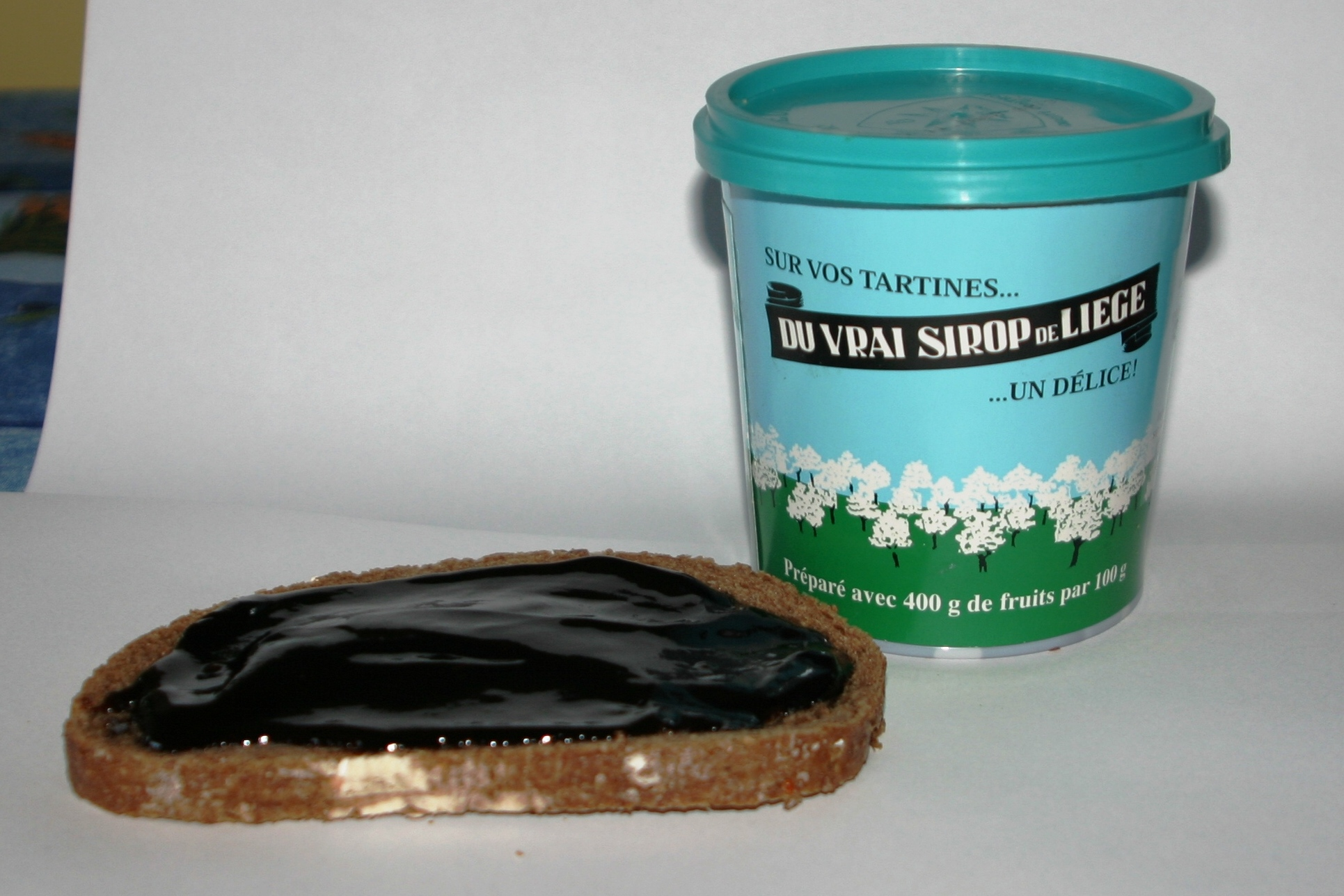 Daggi.